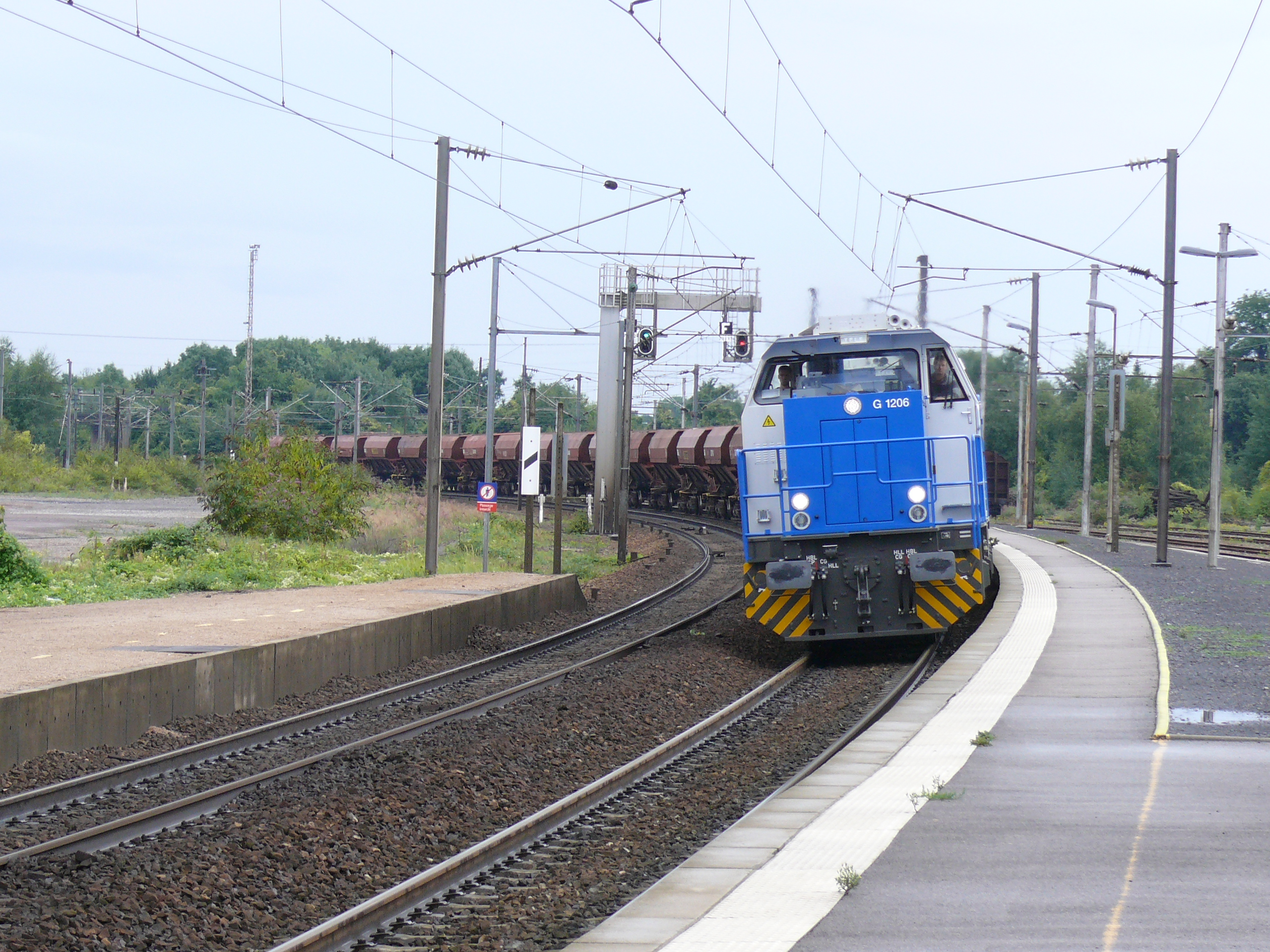 Rame fret tractée par une unité multiple de locomotives Veolia-Cargo en Gare de Saint-Just-en-Chaussée (Oise - Picardie - France)